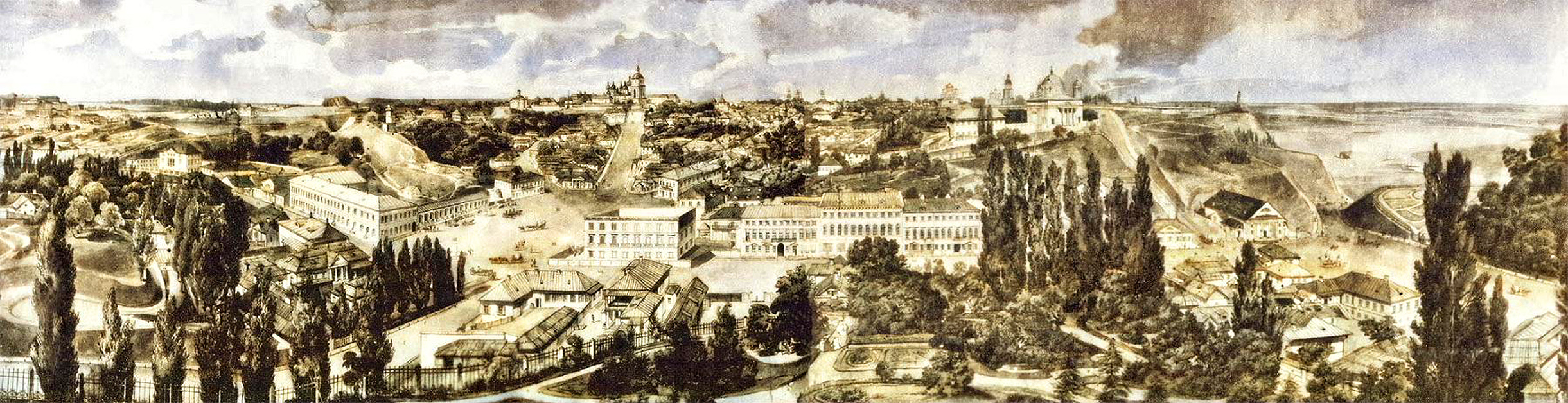 Грот. Малюнок панорами середмістя. 1850